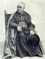 Retrat de Benet Sanz i Forés, bisbe d'Oviedo (1868-1881)